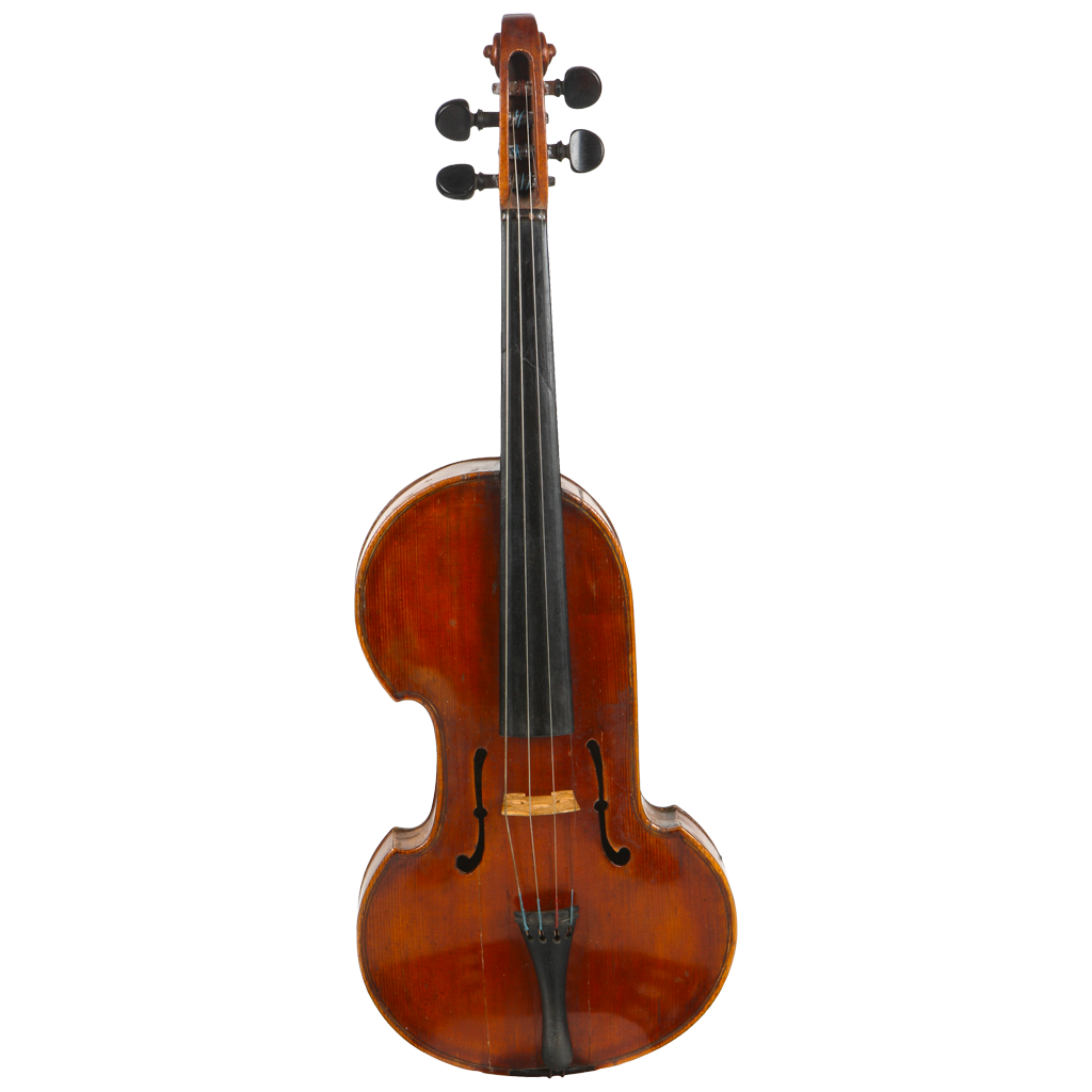 Polskie skrzypce z duszą skrzydlatą - skrzypce wynalezione w dwudziestoleciu międzywojennym przez polskiego rzeźbiarza oraz lutnika Antoniego Hybla.